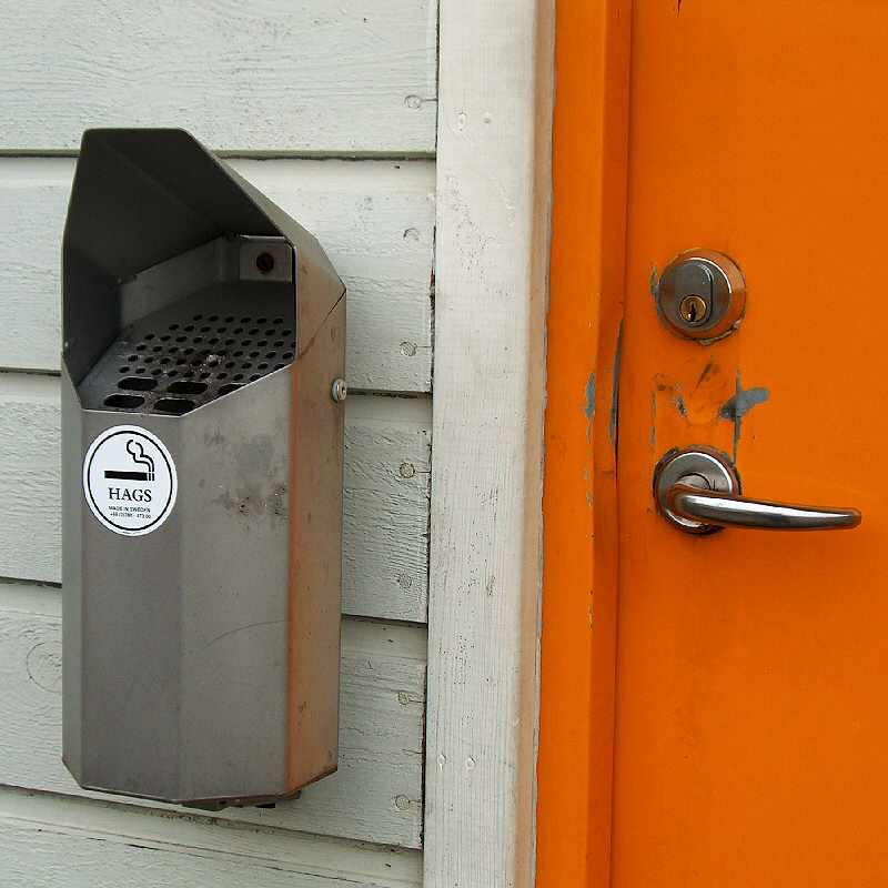 udendørs aksenbæger